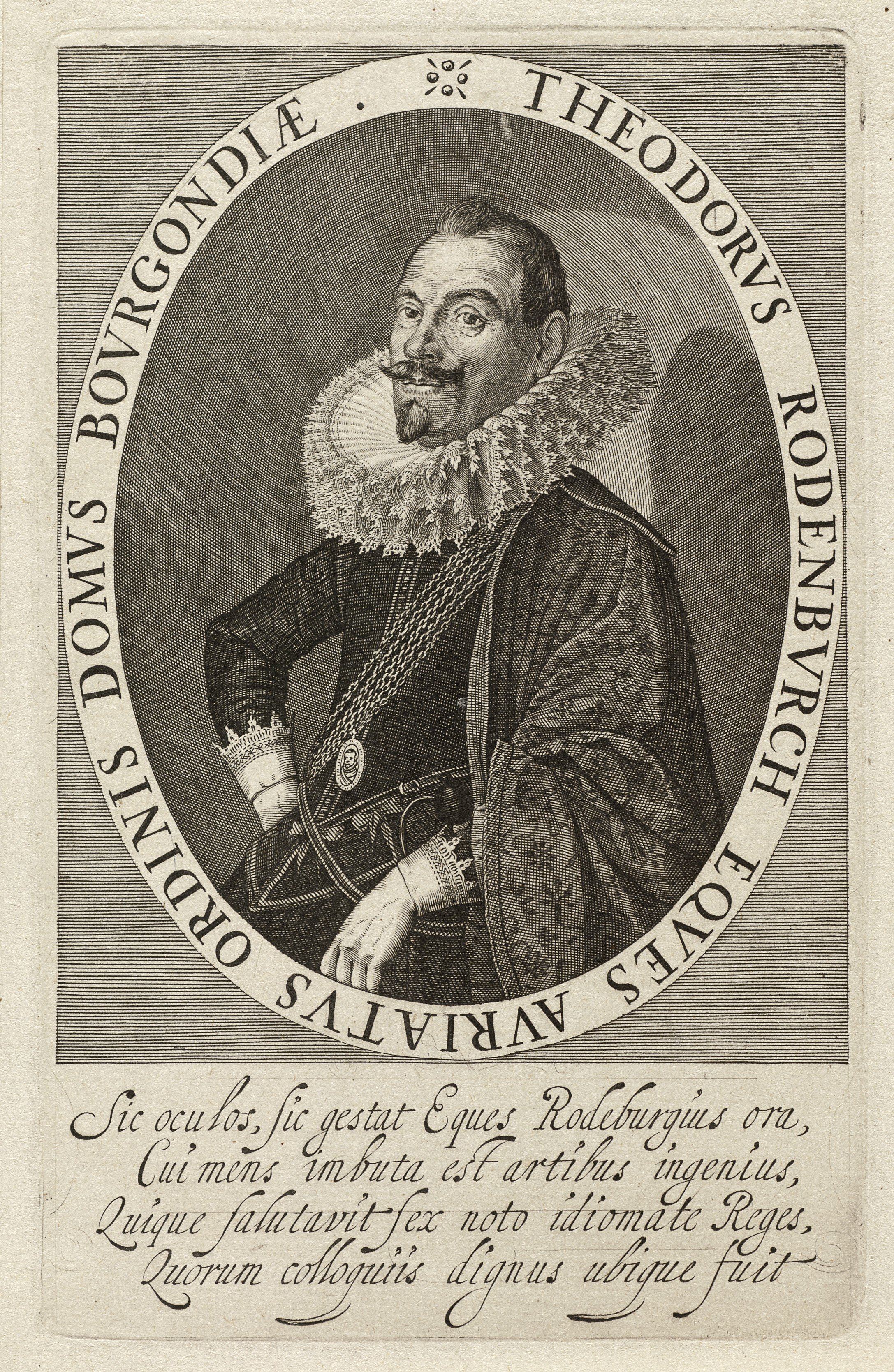 CollectieVoorhelm SchneevoogtInventarisnummerNL-HlmNHA_1477_53009332BeschrijvingPortret van Theodorus Rodenburgh / Rodenburg. Diplomaat en toneeldichter.GravureFotonummerNL-HlmNHA_1477_53009332DocumenttypePortrettenVervaardigerAnoniem PersonenRodenburg, Theodore (1578-1644)Rodenburch, Theodorus Begindatum1625Einddatum1650TechniekGrafiek Drukwerk